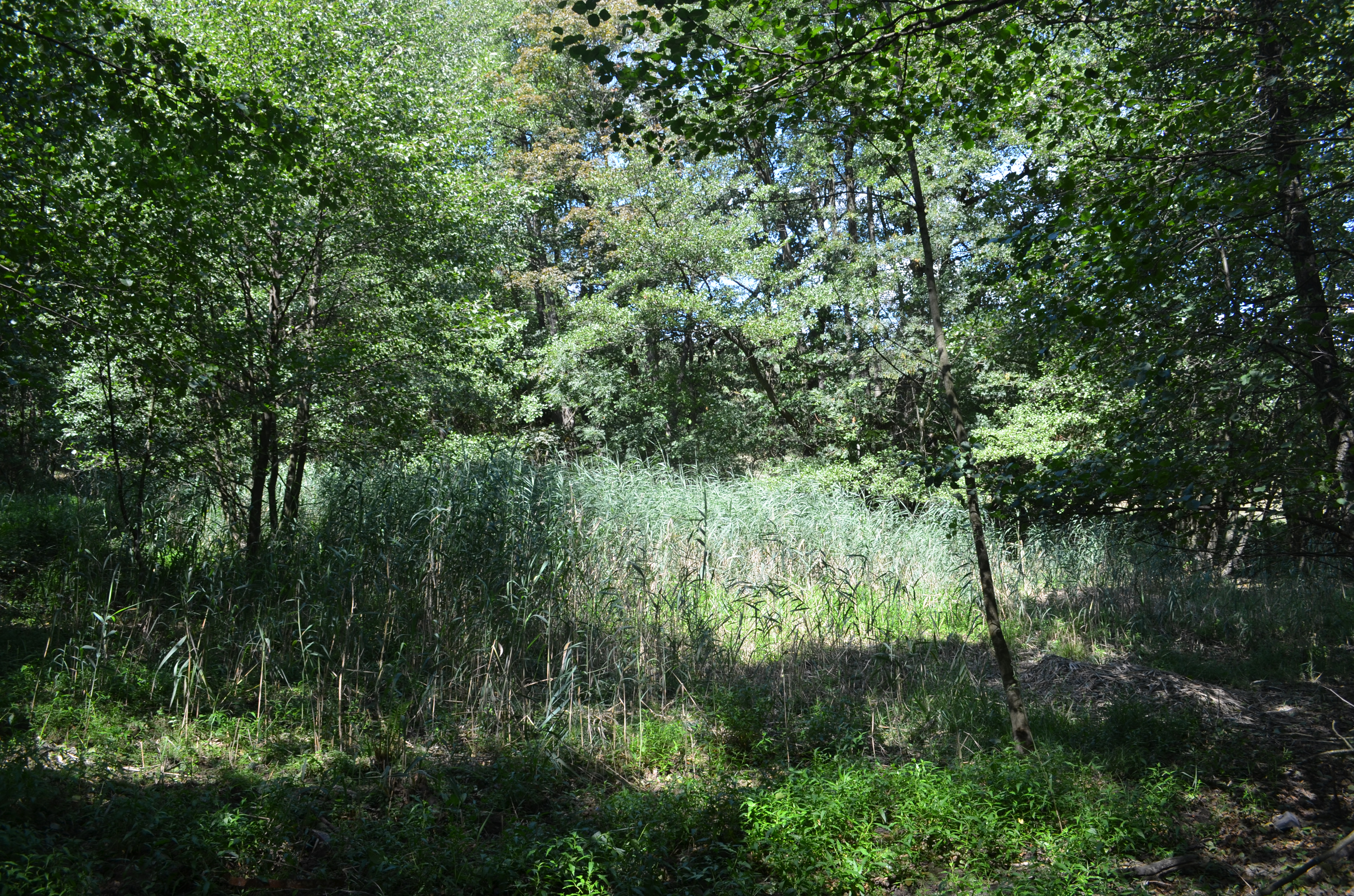 Kronberg, NSG Hinterste Neuwiese bei Kronberg